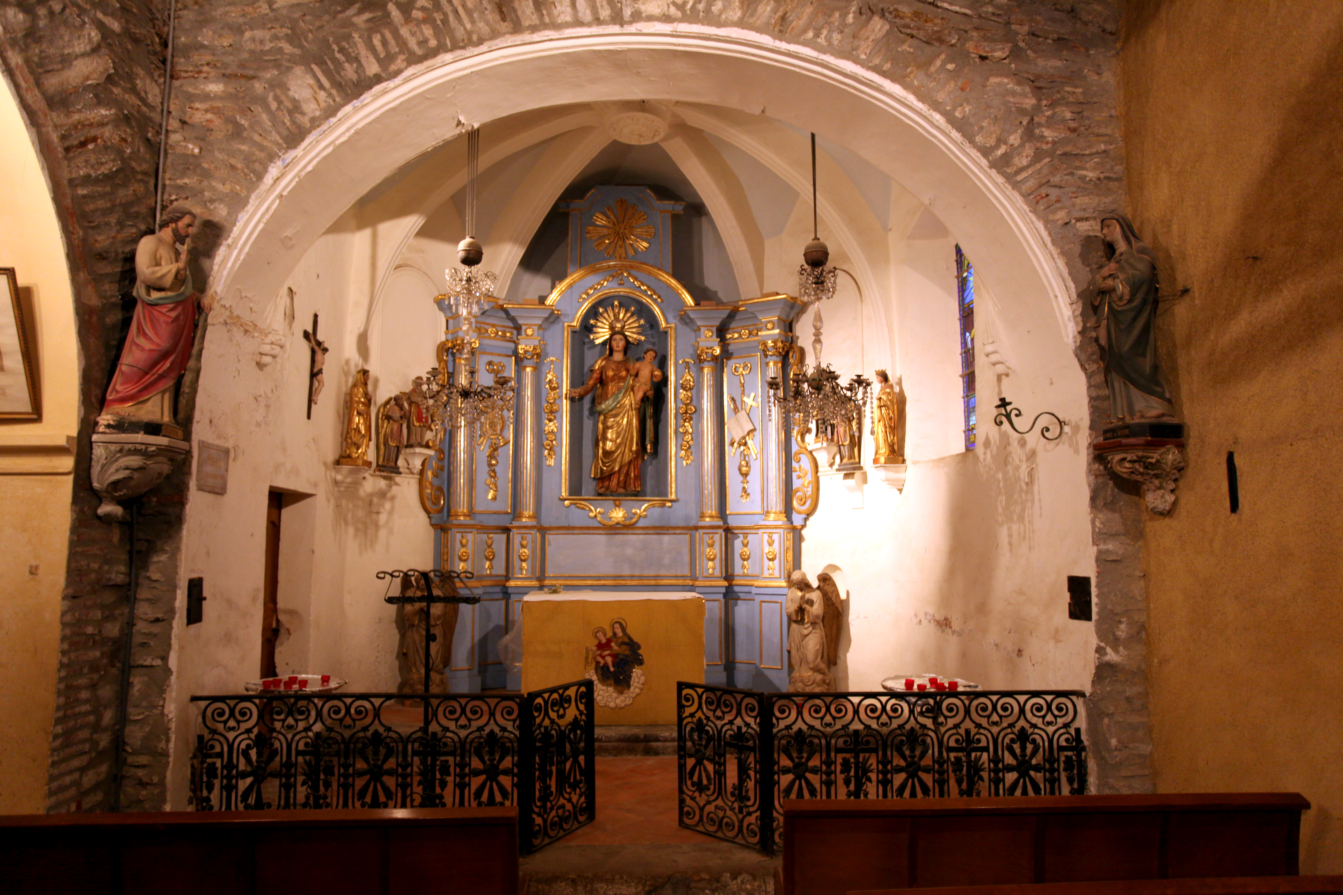 Collioure, Pyrénées Orientales, France. L'ermitage Notre-Dame de Consolation. L'intérieur de la chapelle.